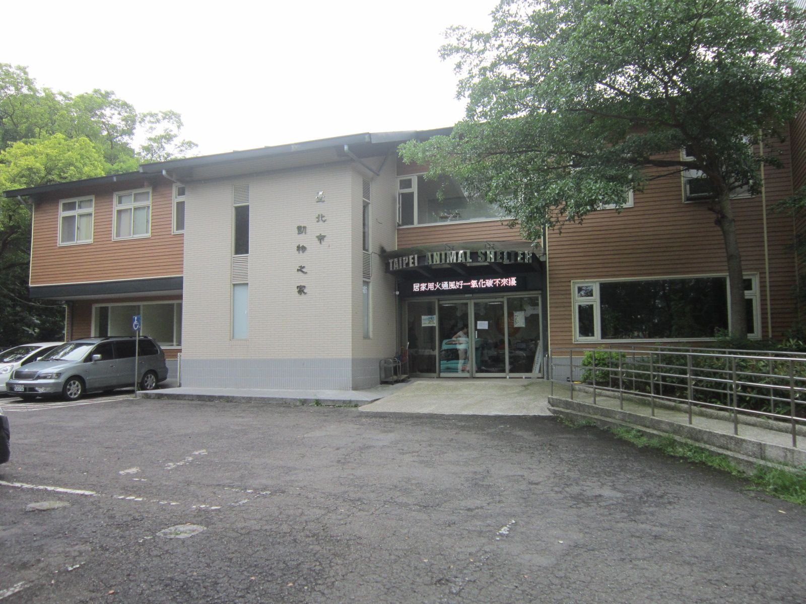 臺北市動物之家，隸屬臺北市動物保護處，位於臺北市內湖區潭美街852號。